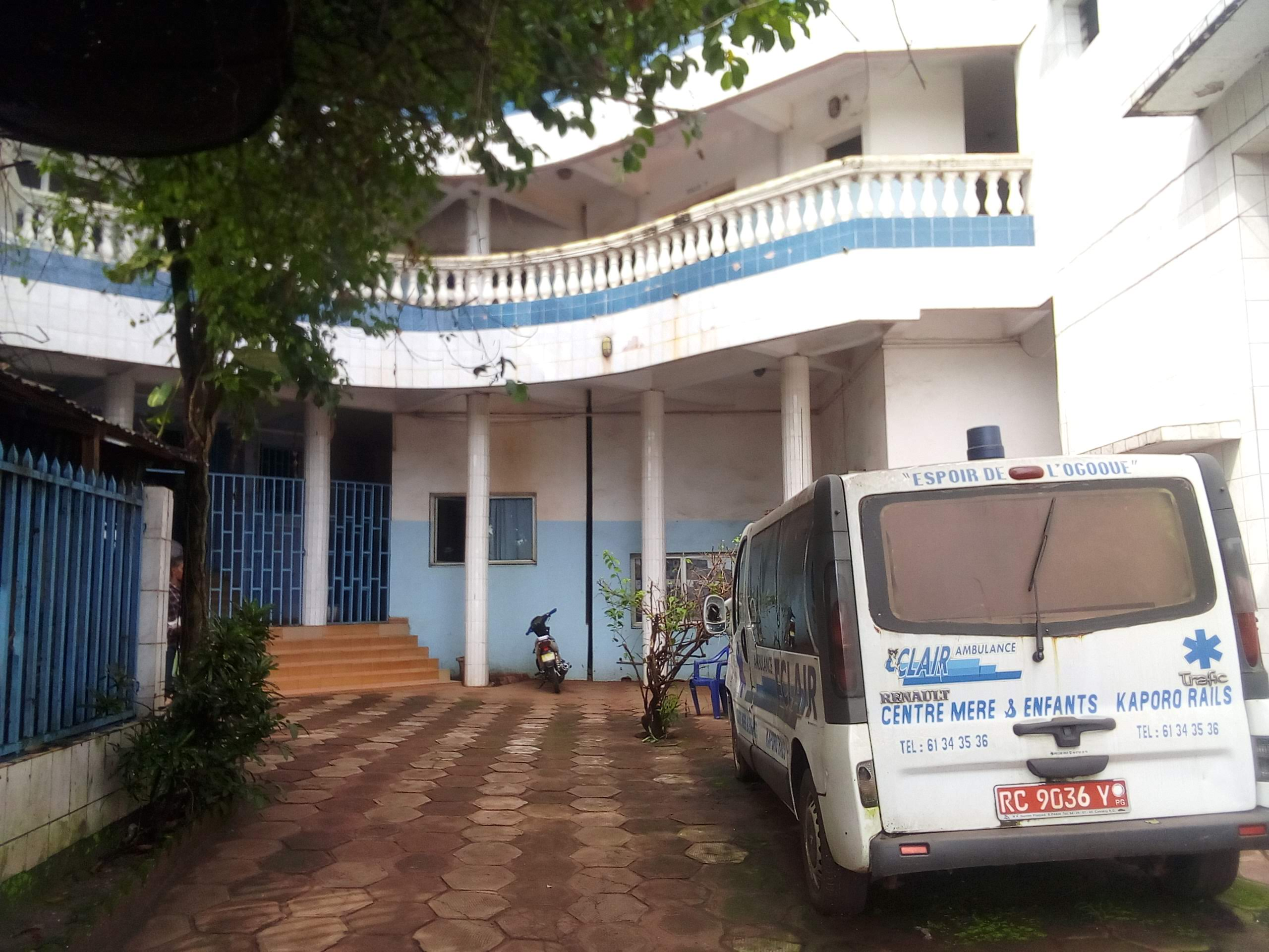 Ambulance a kipé This is an image with the theme "Africa on the Move or Transport" from: Guinea